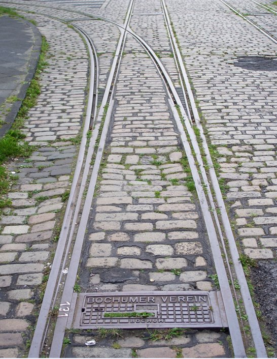 Straßenbahnweiche, hergestellt vom Bochumer Verein, auf einem stillgelegten Gleisabschnitt an der alten Wittener Str. in Bochum, Deutschland.